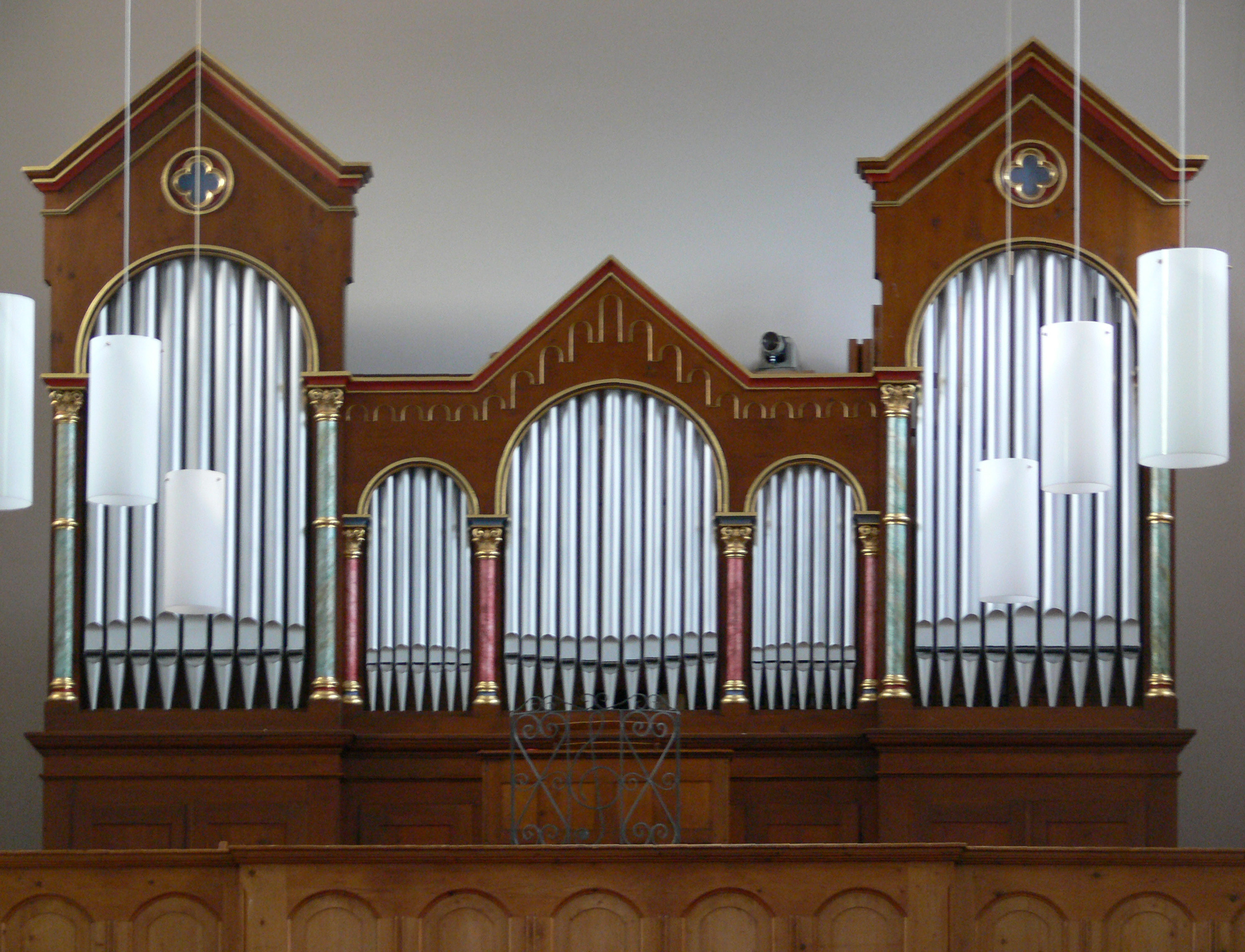 Kath. Pfarrkirche St. Martinus, Hauerz, Stadt Bad Wurzach, Landkreis Ravensburg Orgel von Albert Reiser